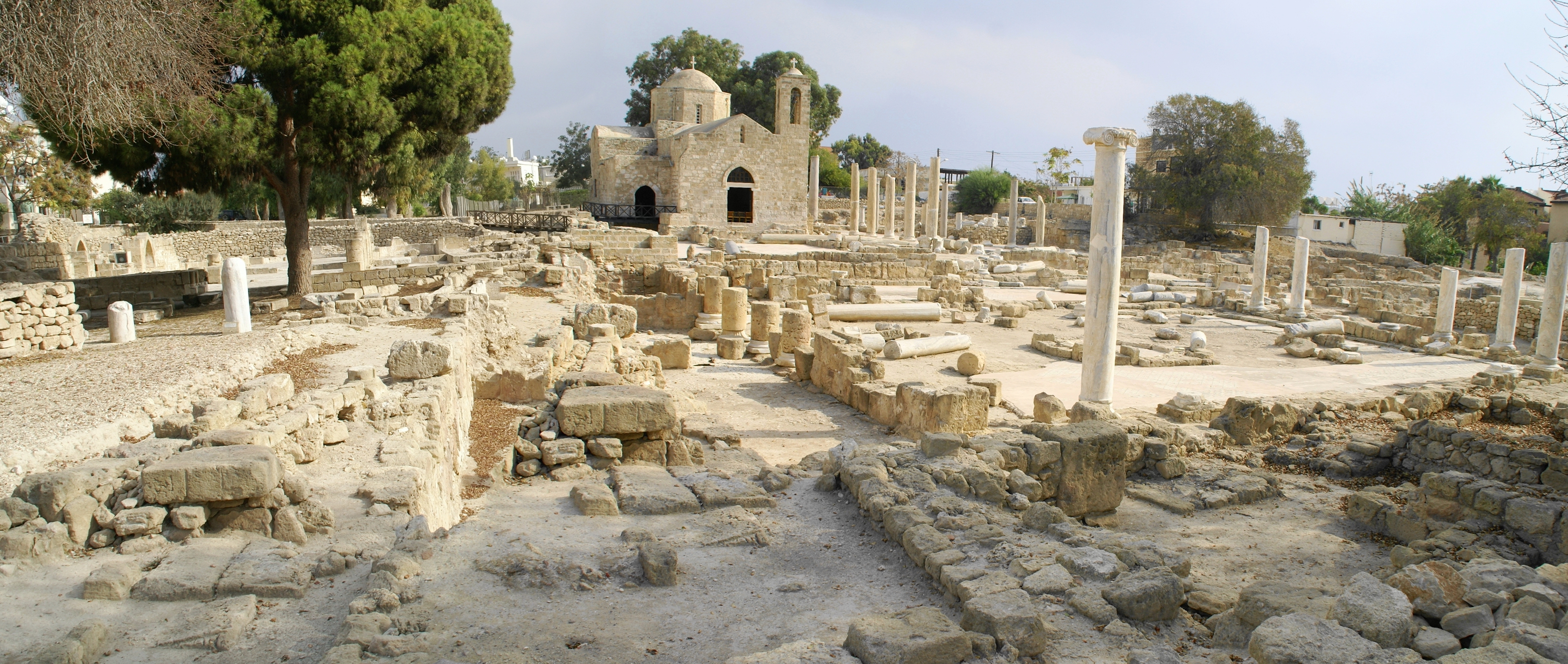 Chrysopolitissa - Komplex in Paphos mit Paulussäule (links), der aktuellen Kirche (Ayia Kyriaki Chrysopolitissa) und den Ausgrabungen der Vorgängerbauten